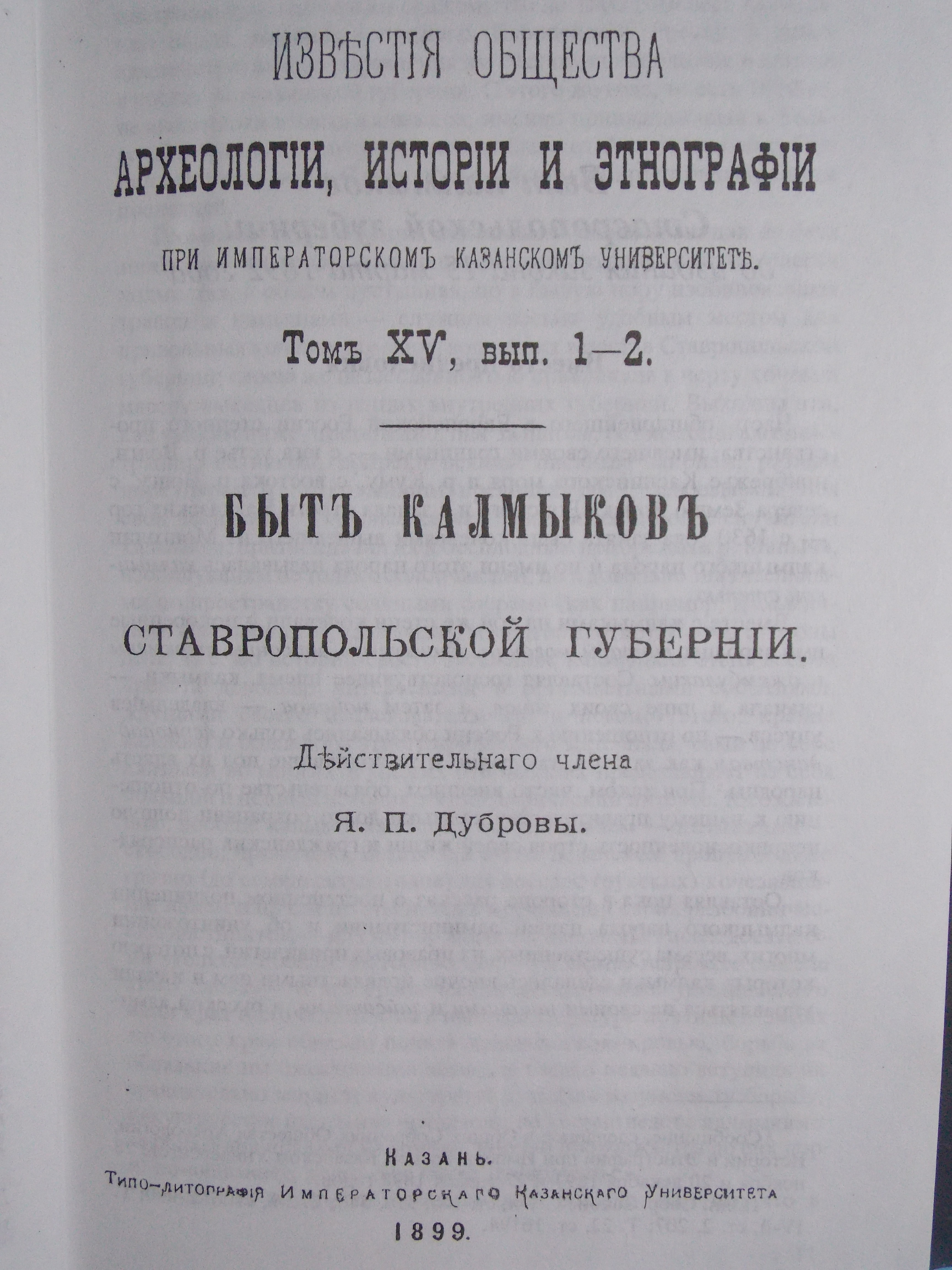 Обложка книги Якова Дубровы "Быт калмыков Ставропольской губернии", 1899 года издания